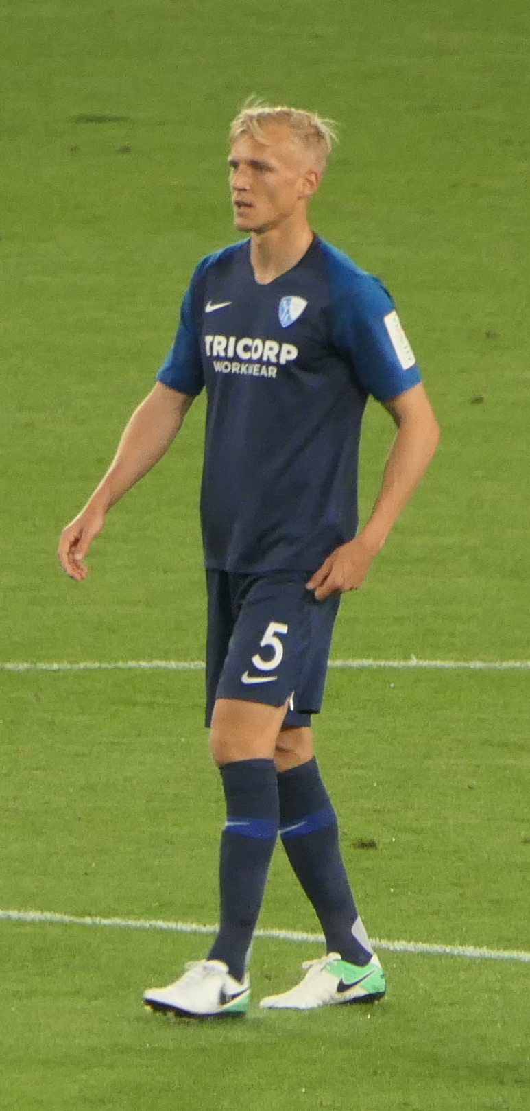 Der Fussballprofi Saulo Decarli im Trikot vom VfL Bochum beim Auswärtsspiel gegen den VfB Stuttgart am 02.09.2019.